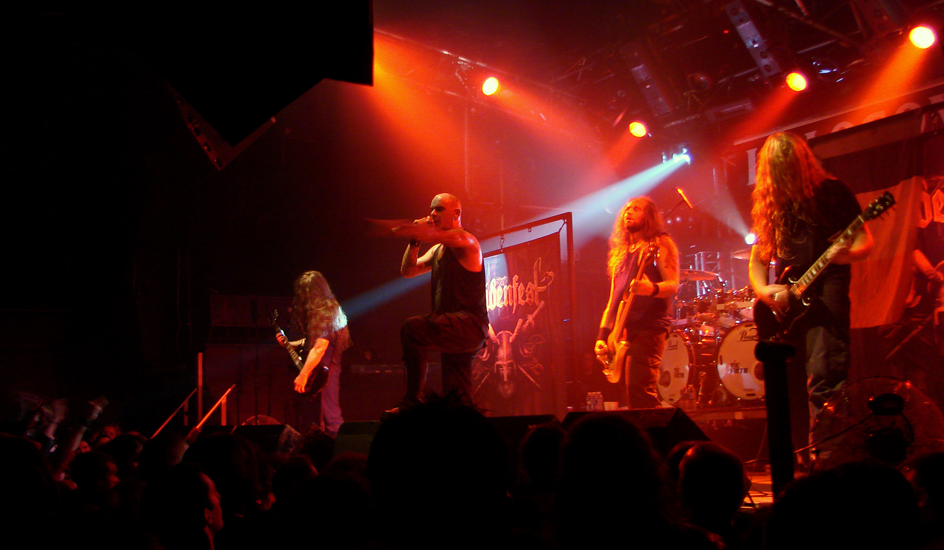 Primordial en concert à la Locomotive, à Paris, pendant le Heidenfest Tour 2008.